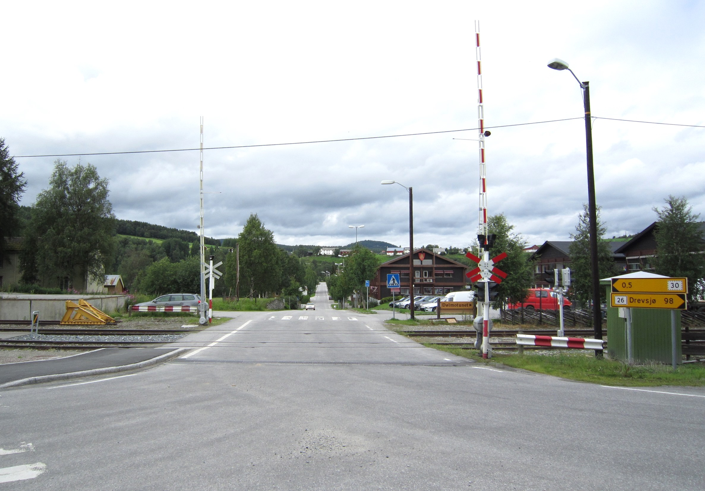 Primær fylkesvei 26 krysser Rørosbanen ved Tolga stasjon